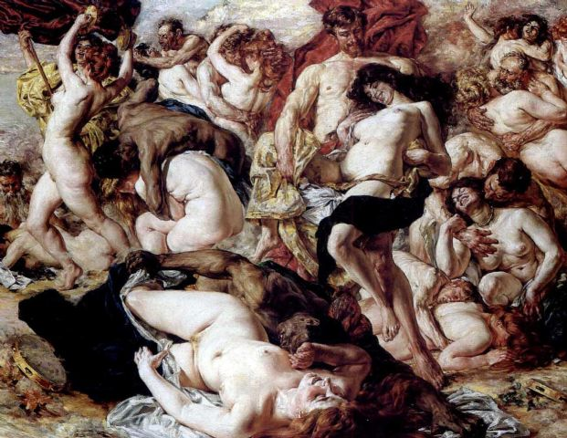 Bacchanalia.